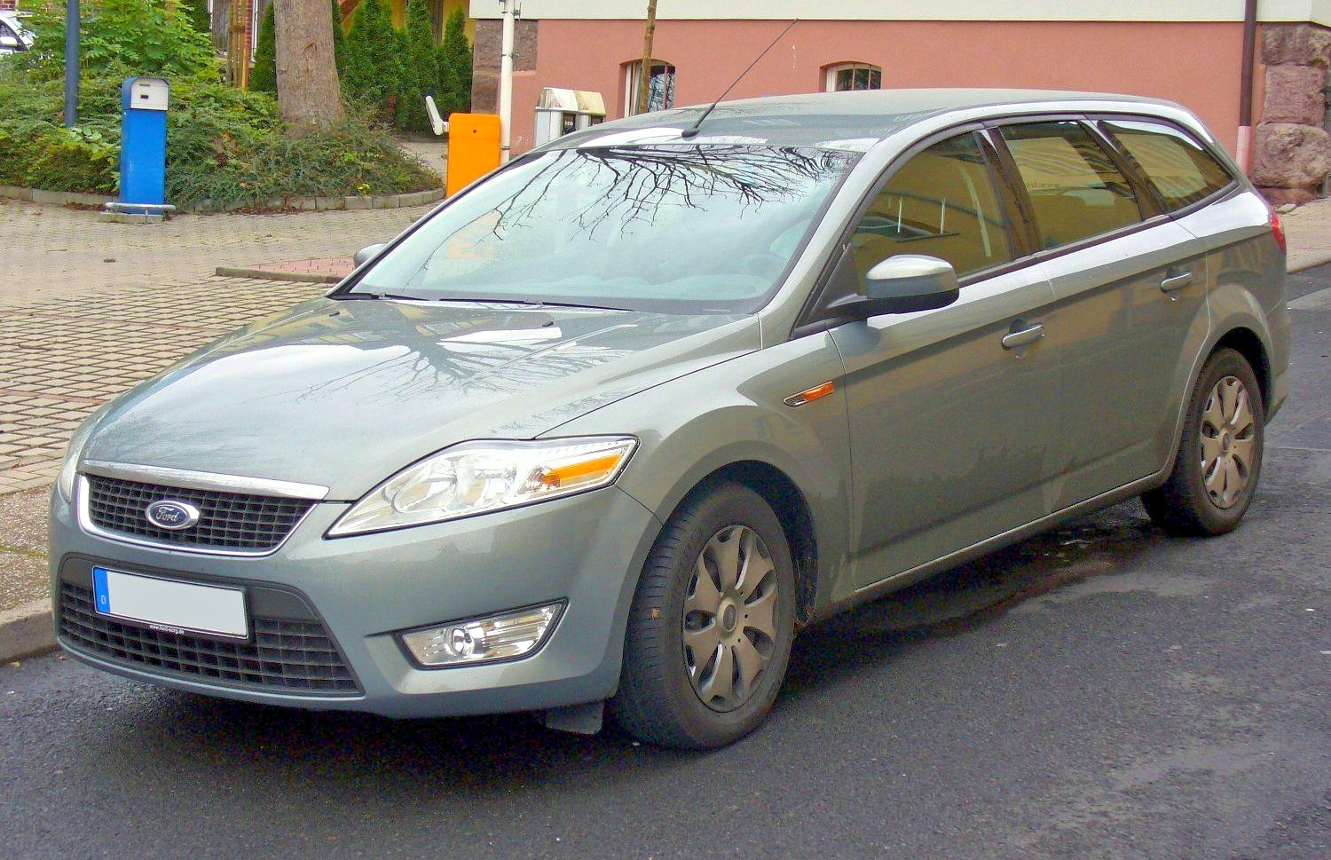 Ford Mondeo Turnier